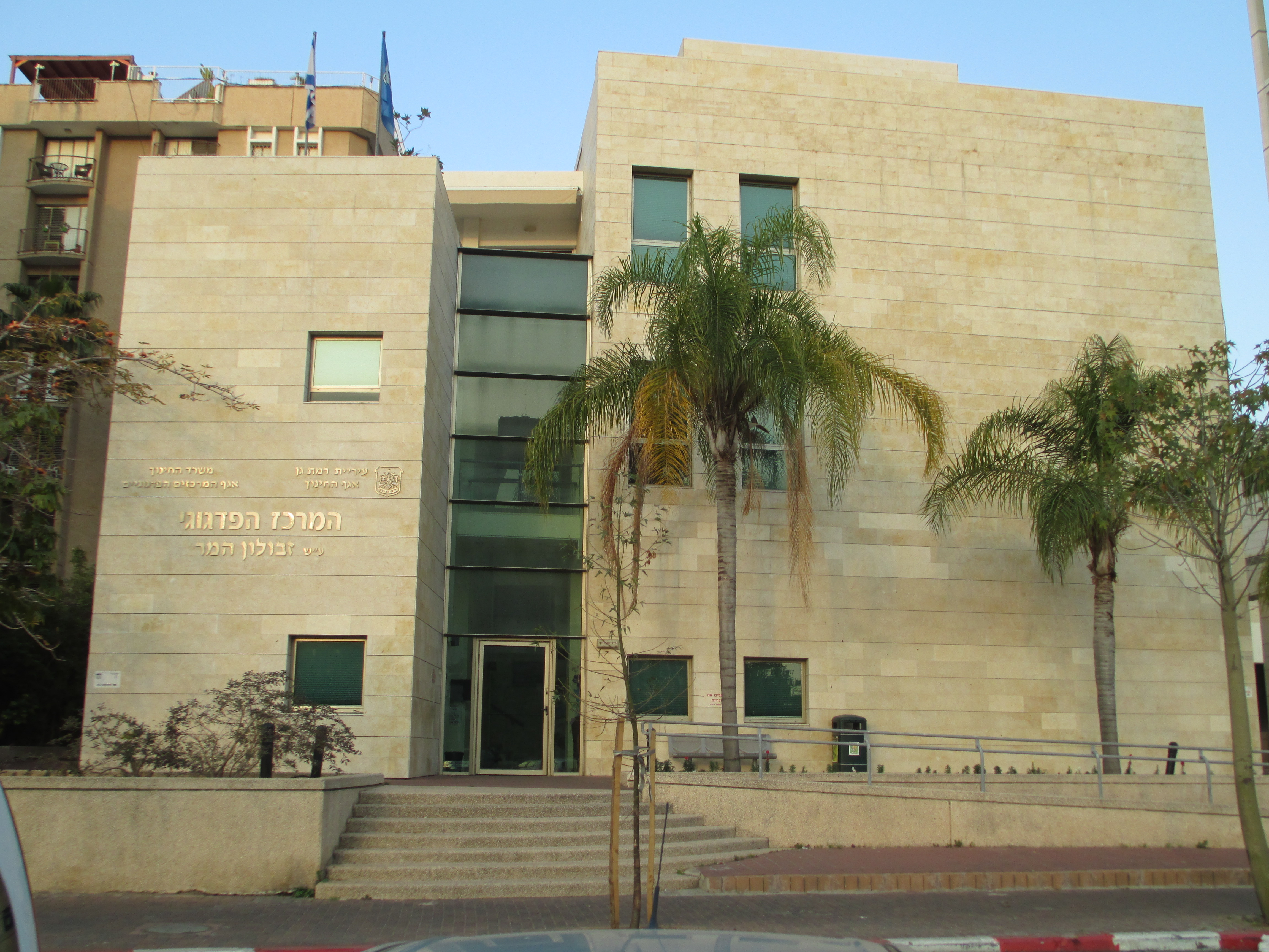 המרכז הפדגוגי על שם זבולון המר ברמת גן